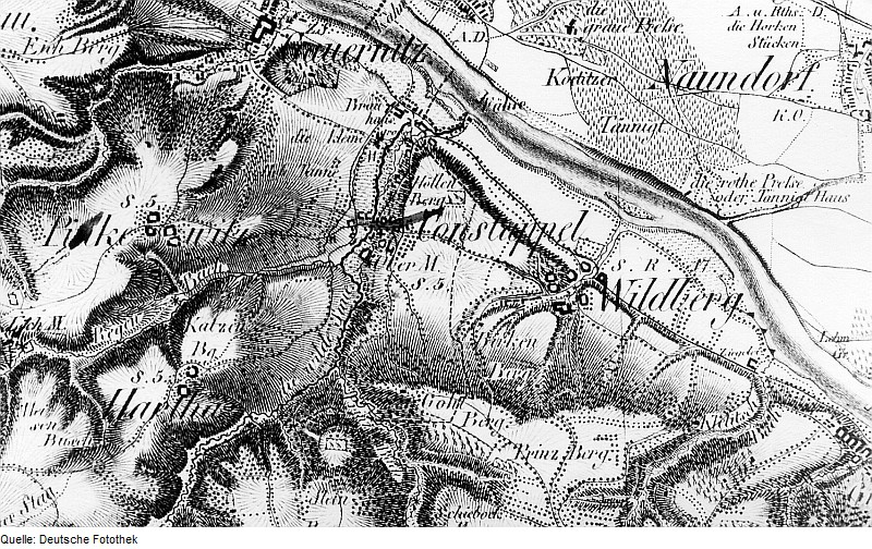 Original image description from the Deutsche Fotothek Klipphausen-Constappel. Oberreit, Sect. Dresden, 1821/22